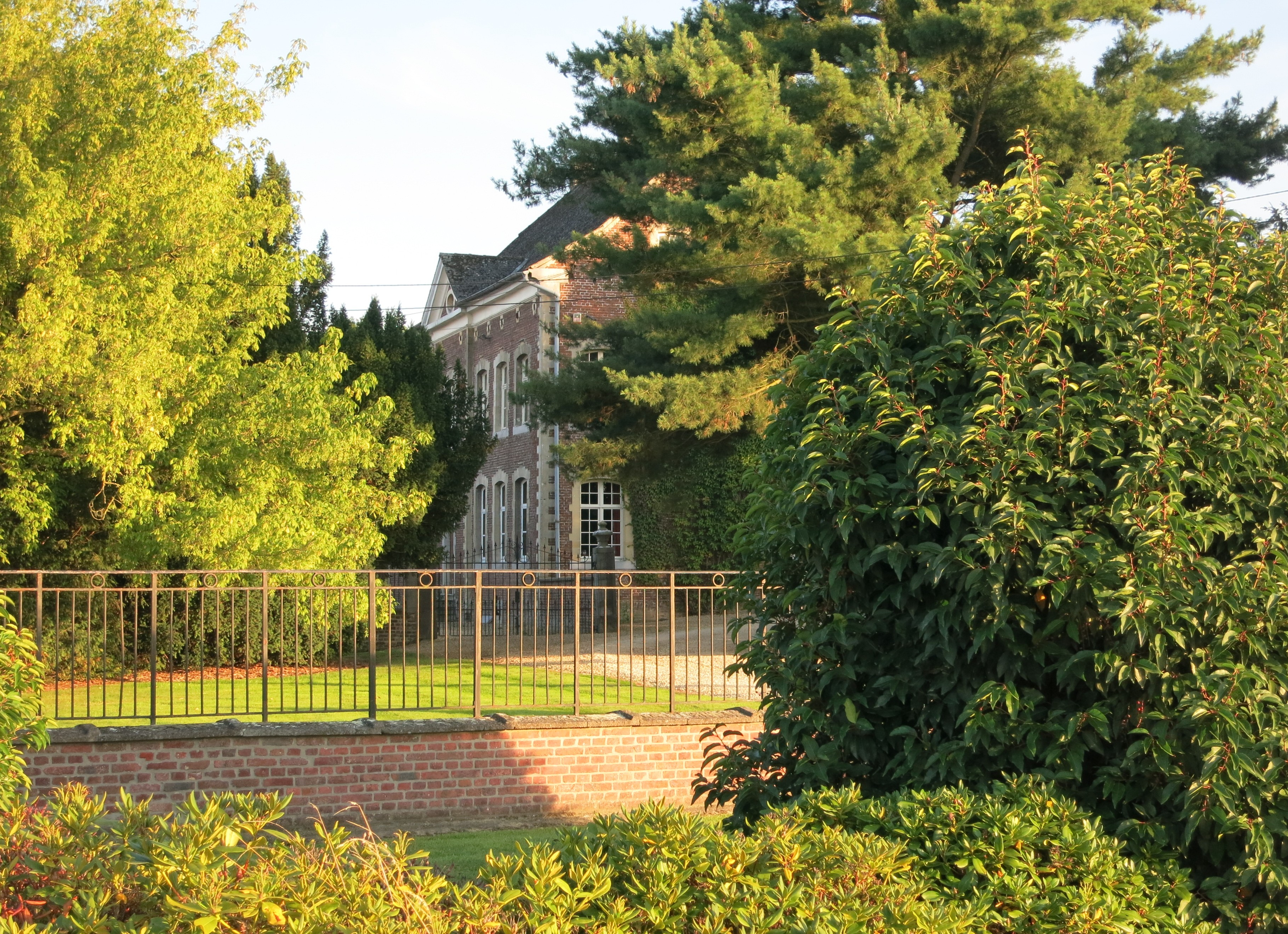 Kasteel de Corswarem, ook genoemd Kasteel Rodenpoel aan de Hameestraat in Alken